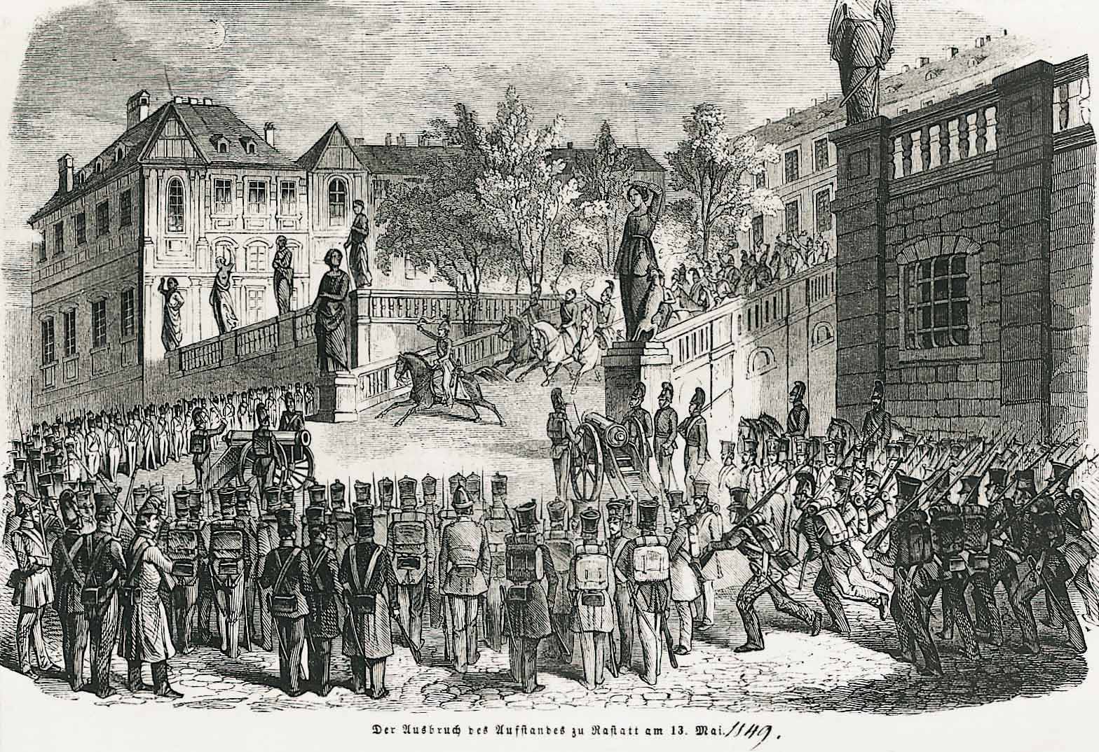 Ausbruch des Aufstands in Rastatt, 13. Mai 1849 (GLAK J-G-R/6)